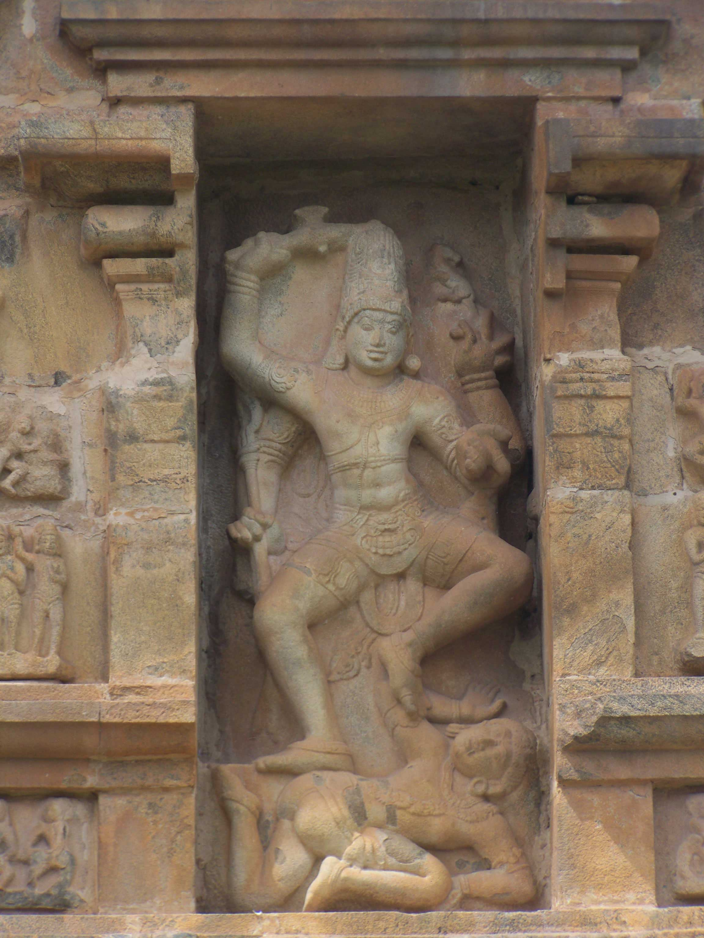 கோயிலின் வடபுறத்தில் உள்ள சிற்பங்களுள் ஒன்று